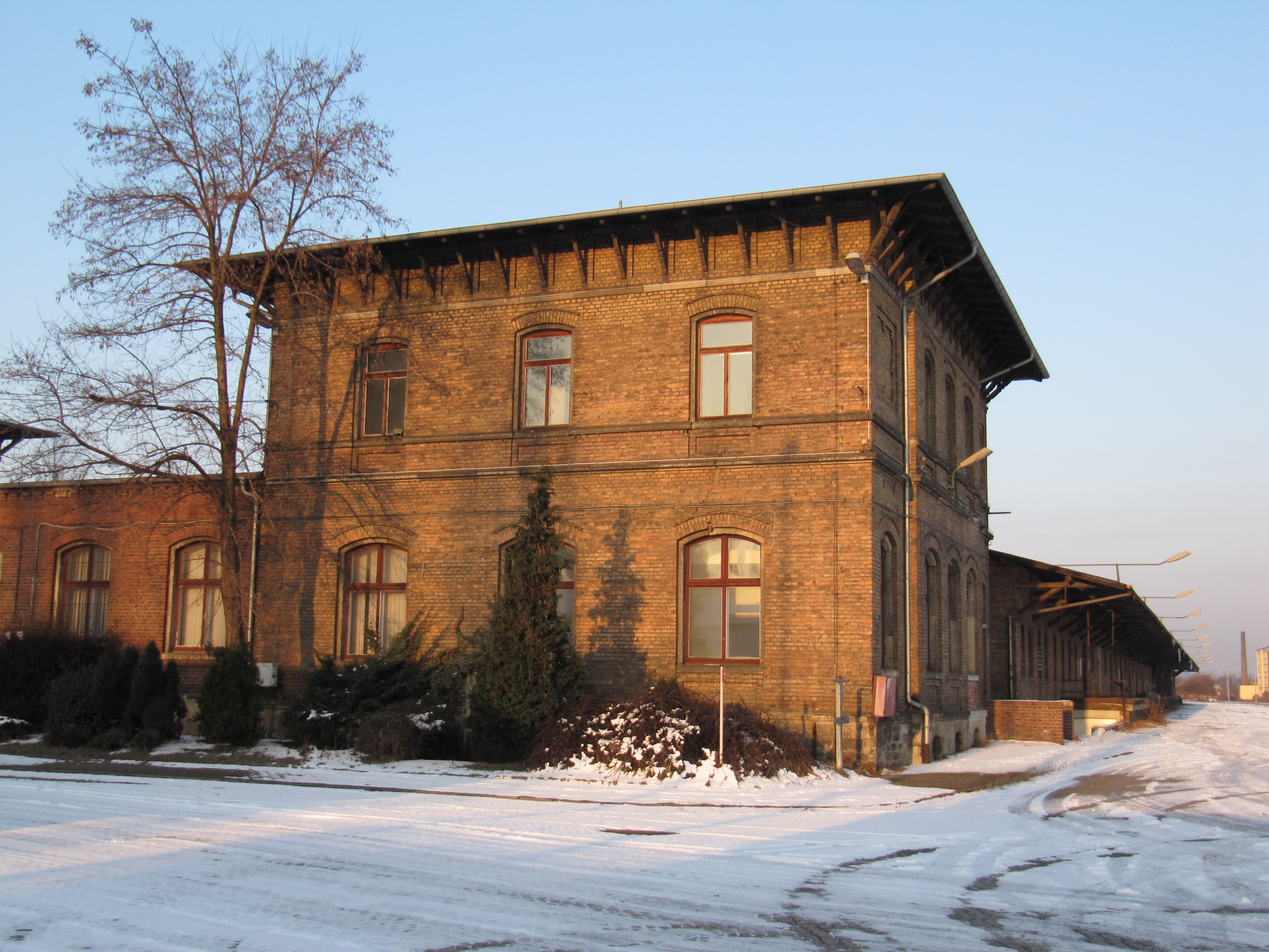 Expeditionsgebäude des Güterschuppens des ehemaligen Berliner Bahnhofs in Dresden (heute Bestandteil des Ortsgüterbahnhofs)